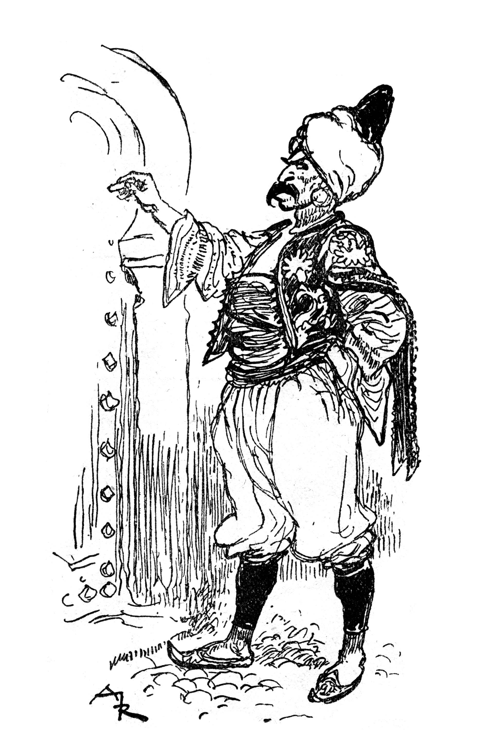 Illustration d'Alibaba et les quarante voleurs par Albert Robida